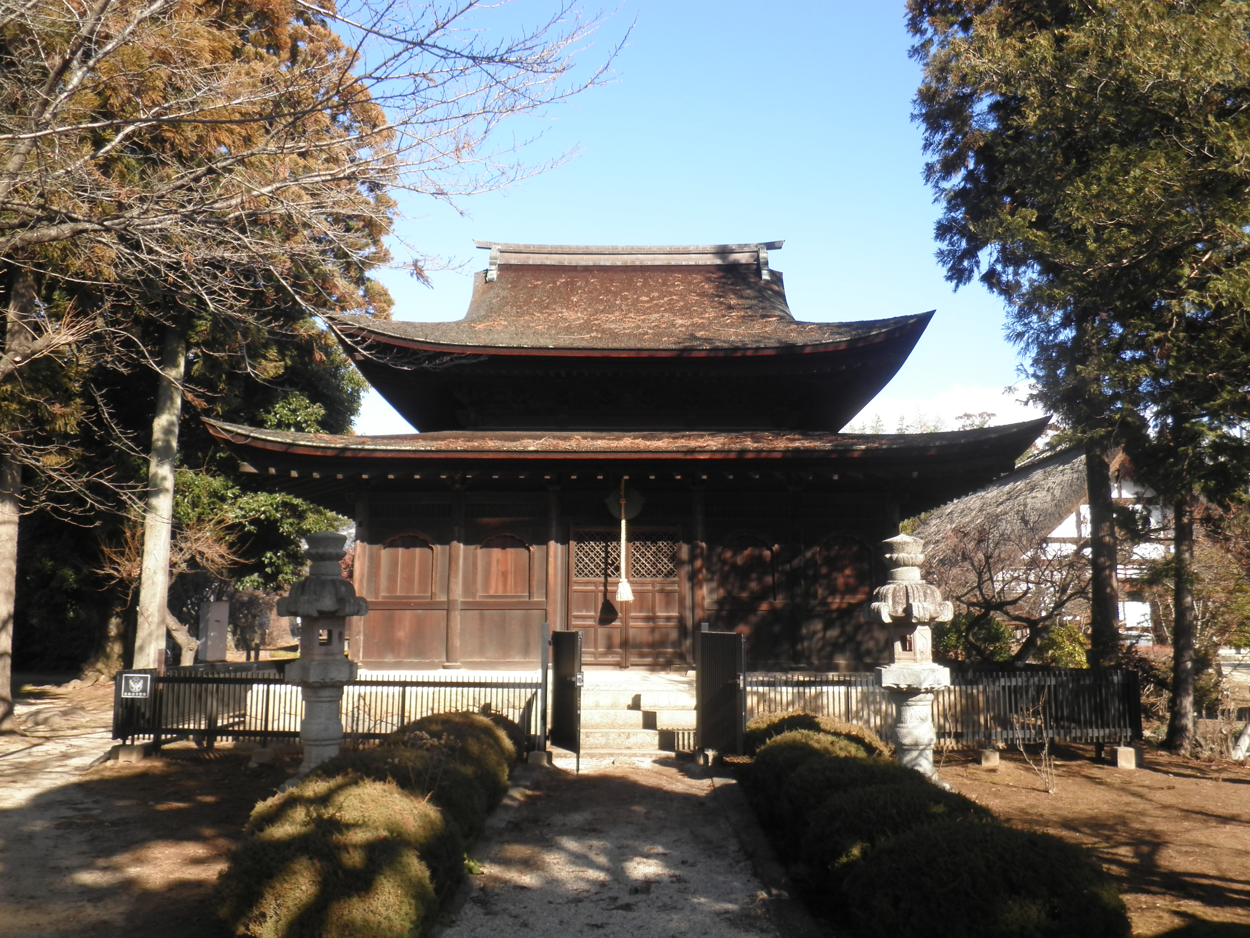 国宝です。